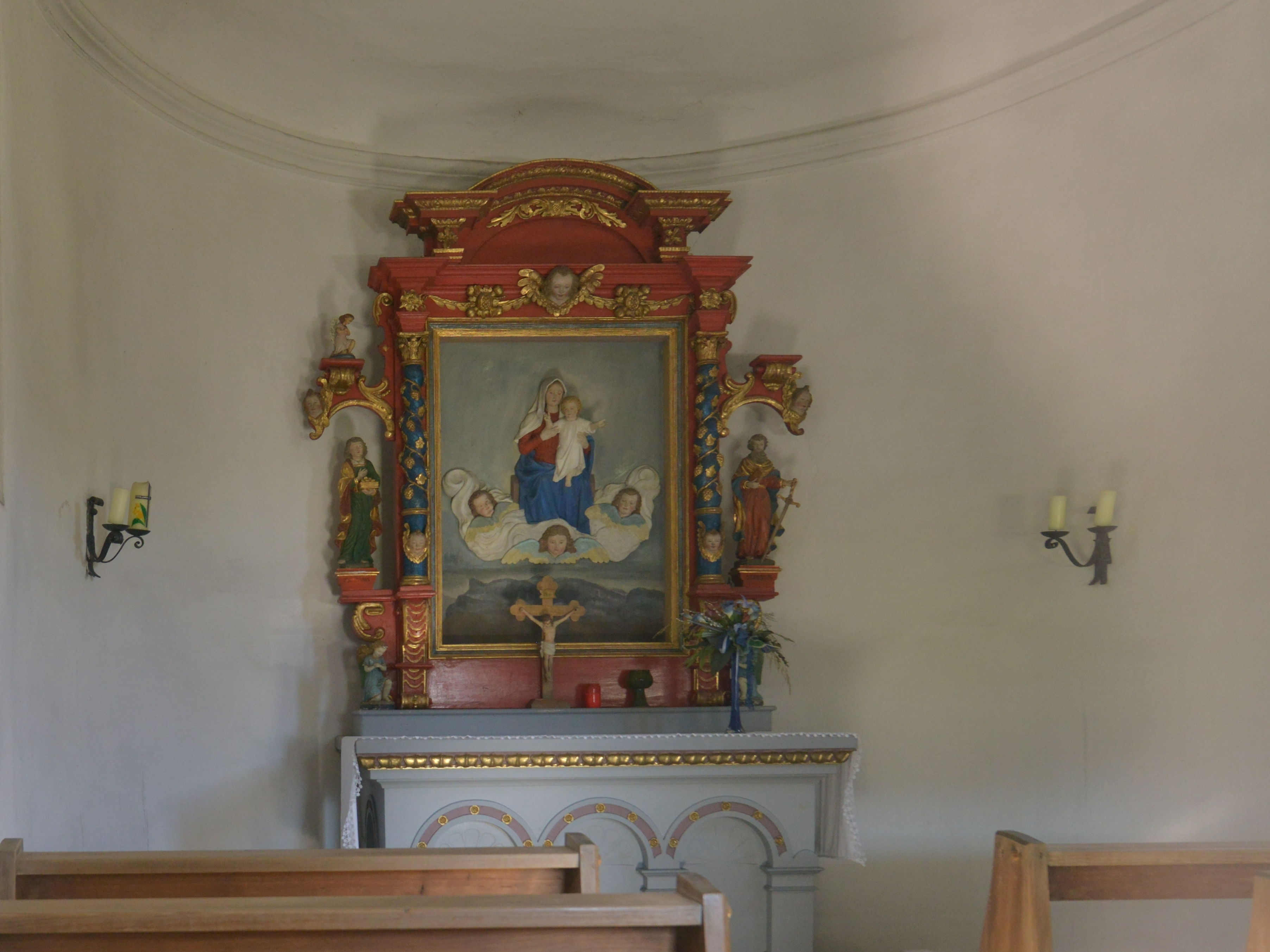 aus dem DEHIO Vorarlberg 1983: Kapelle am Kobel in Götzis, westlich der Straße auf einem Hügel stehend. Erbaut 1797 aus Dank für den Sieg gegen die Franzosen im Kampf am Kobel 1796, gestiftet von den Gemeinden Götzis, Rankweil und Koblach. 1983 restauriert. Rechteckbau mit eingezogener Apsis unter Satteldach, Glockentürmchen über der Fassade. Rundbogenportal mit Steinrahmung, im Scheitelstein bezeichnet 1997. Betraum mit Flachdecke über Gesims, Rundapsis.